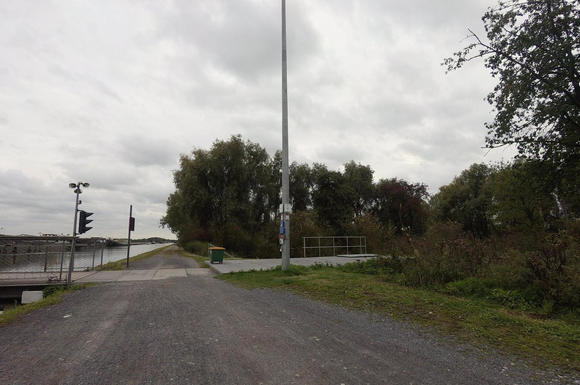 Zennegatsluisbruig, gedeelte achter de aanbrug, Belgium